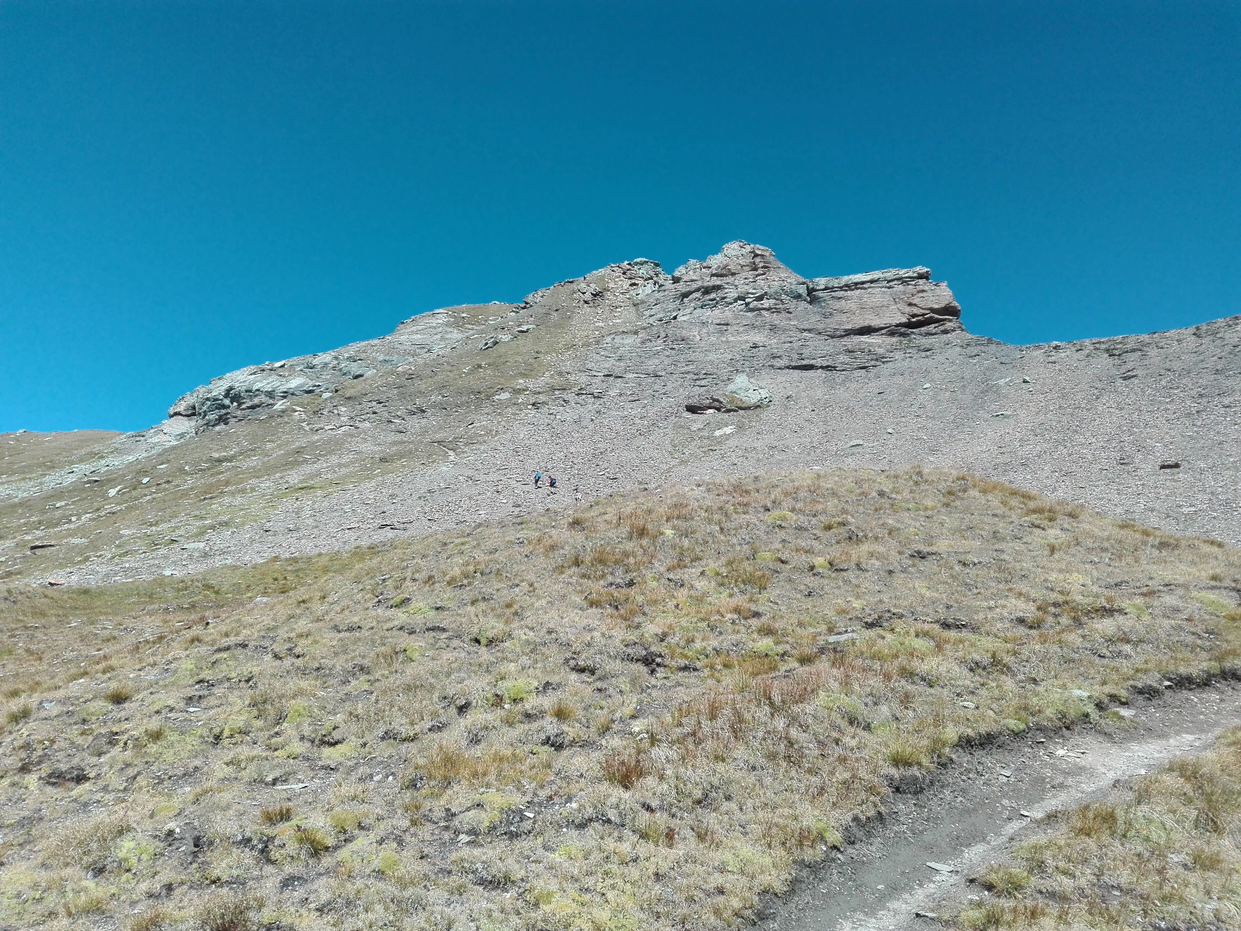 Il Corno Bussola nel suo versante sud